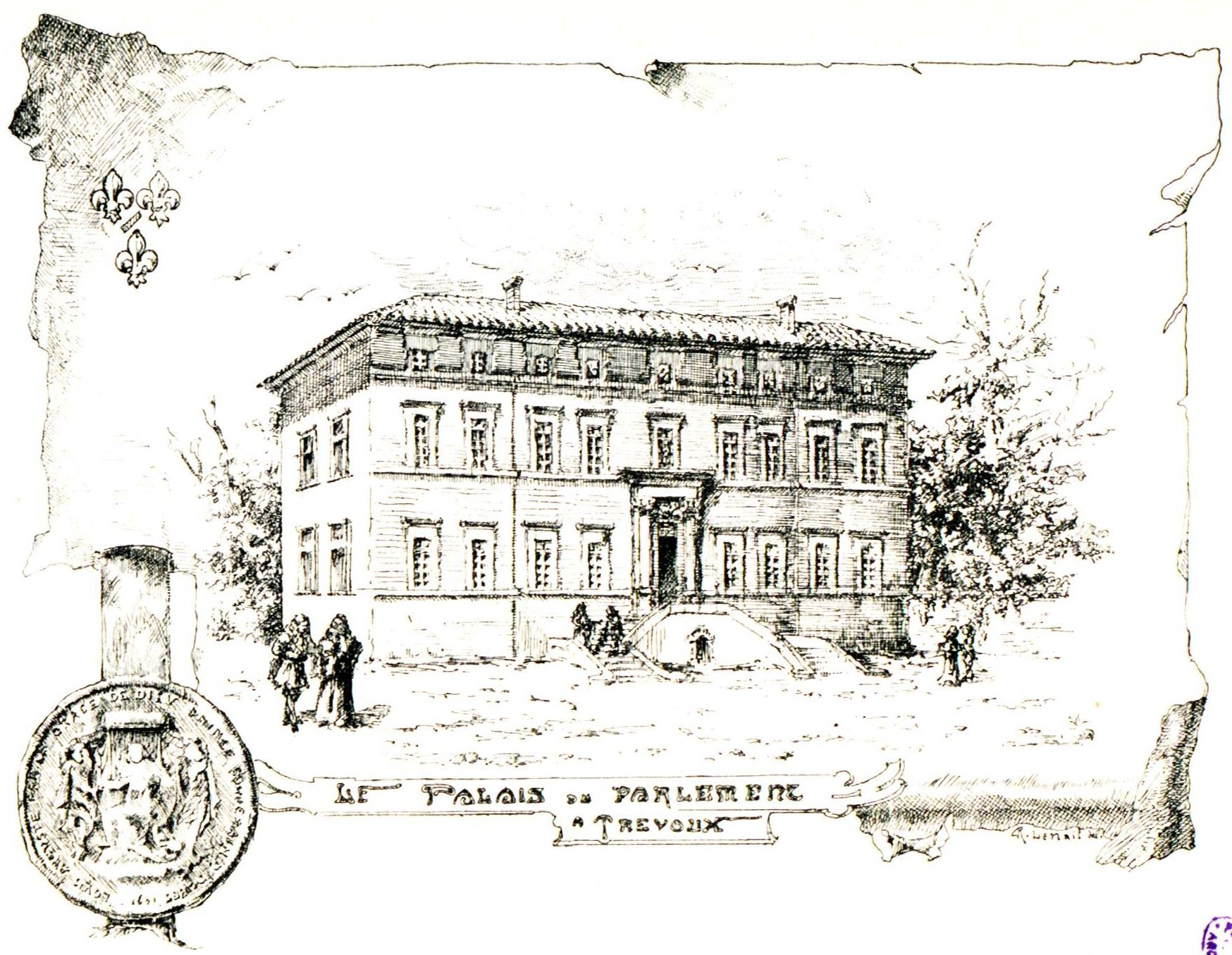 Extrait de P. Lenail, Le Parlement des Dombes, 1900, page 145. ADRML. Construit en 1710. En haut, les armes du duc du Maine. En bas, son sceau avec la devise Louis Auguste de Bourbon, par la grâce de Dieu, prince souverain de Dombes.